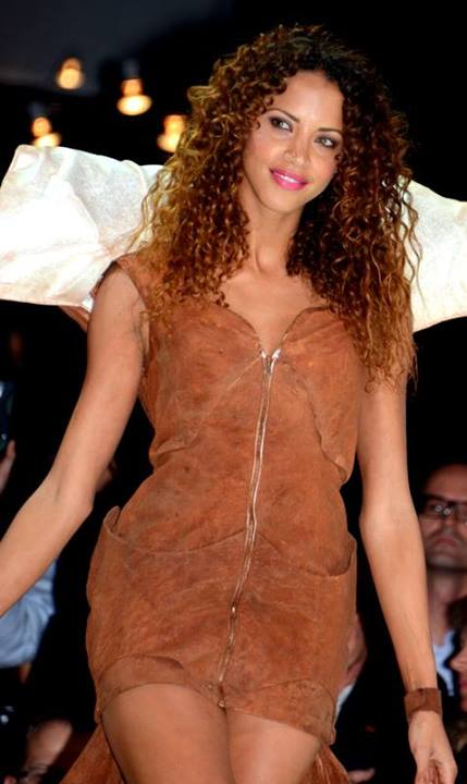 Noémie Lenoir au défilé de mode du salon du chocolat.